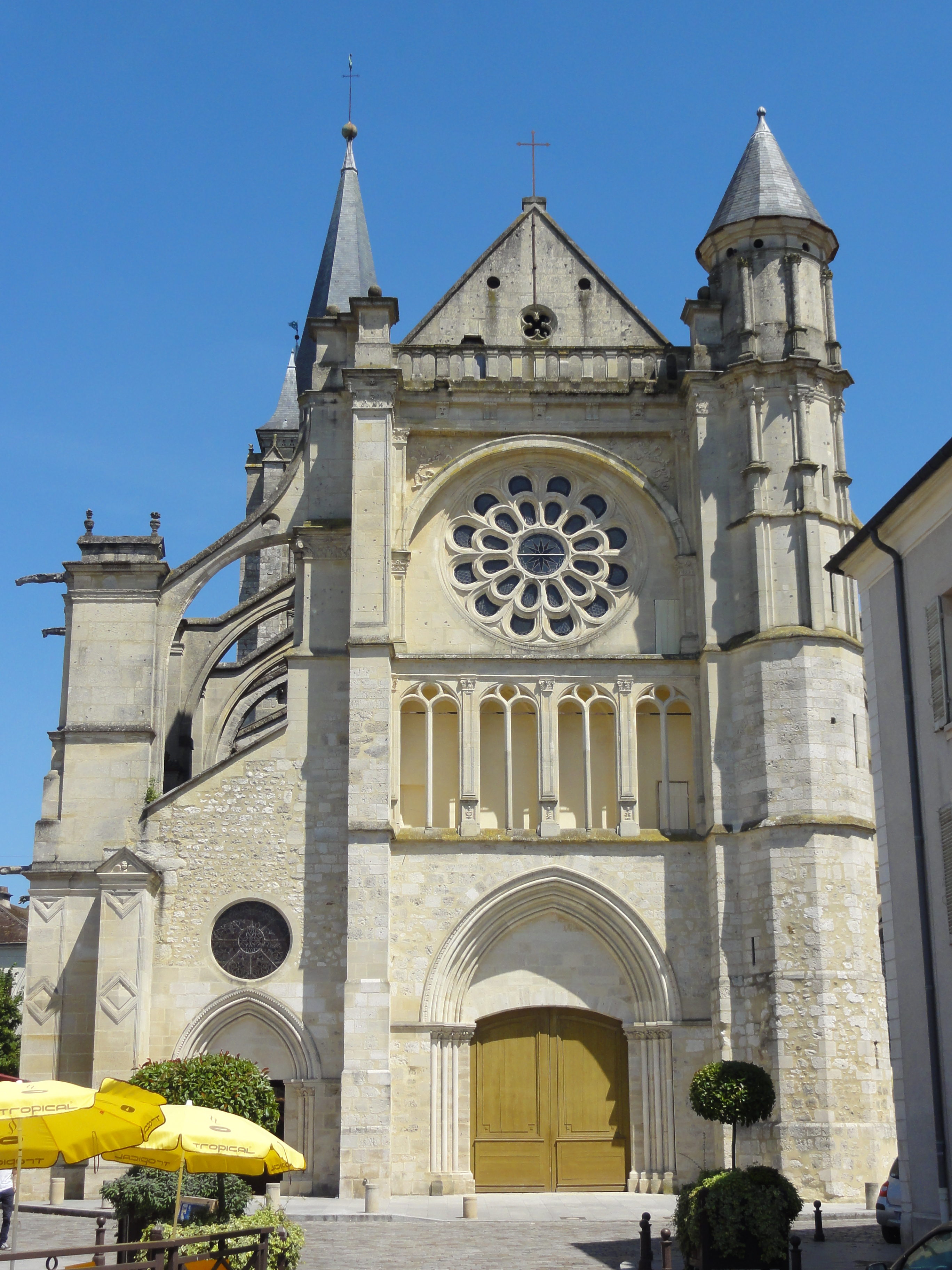 Façade occidentale.